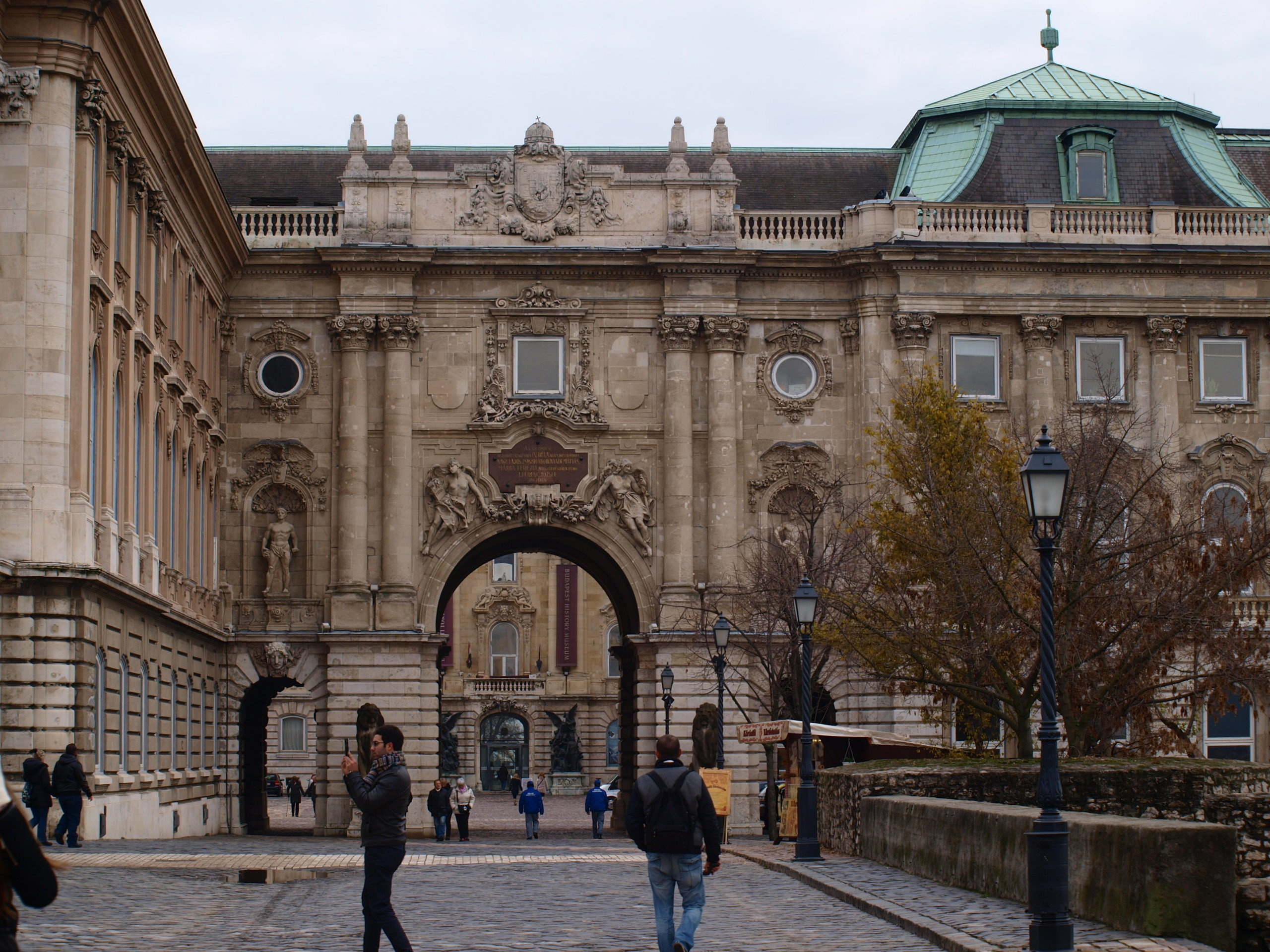 Budínský hrad - západní křídlo